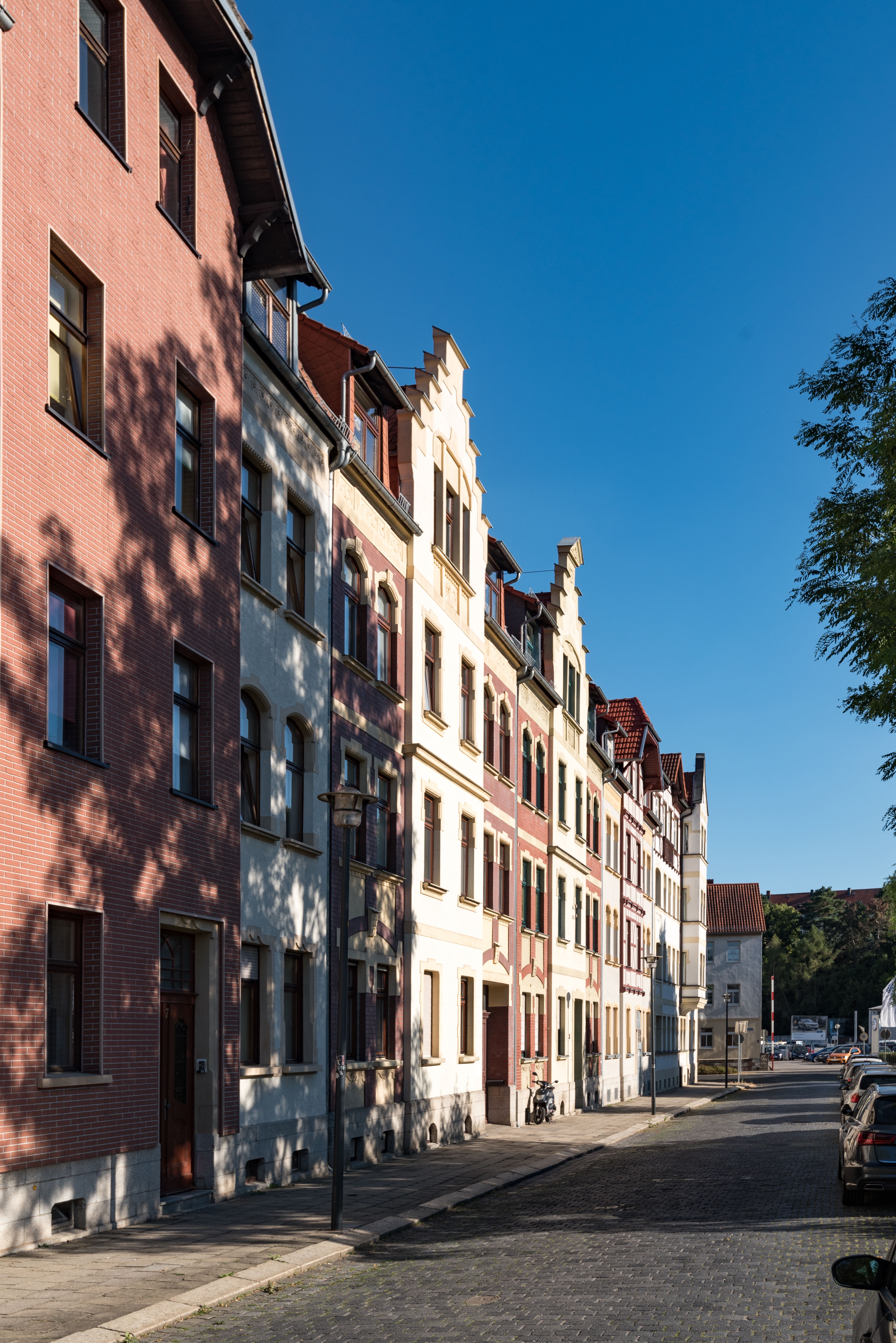 Weißenfels, Harnischstraße 7, 5, 3, 1